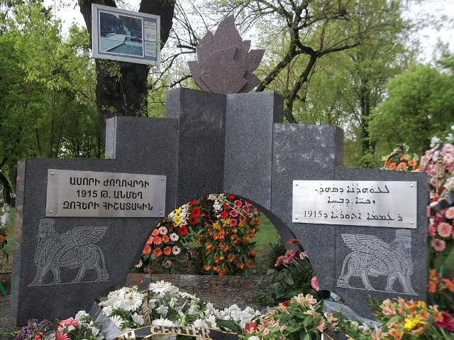 Ասորիների ցեղասպանության հուշահամալիր, Երևան